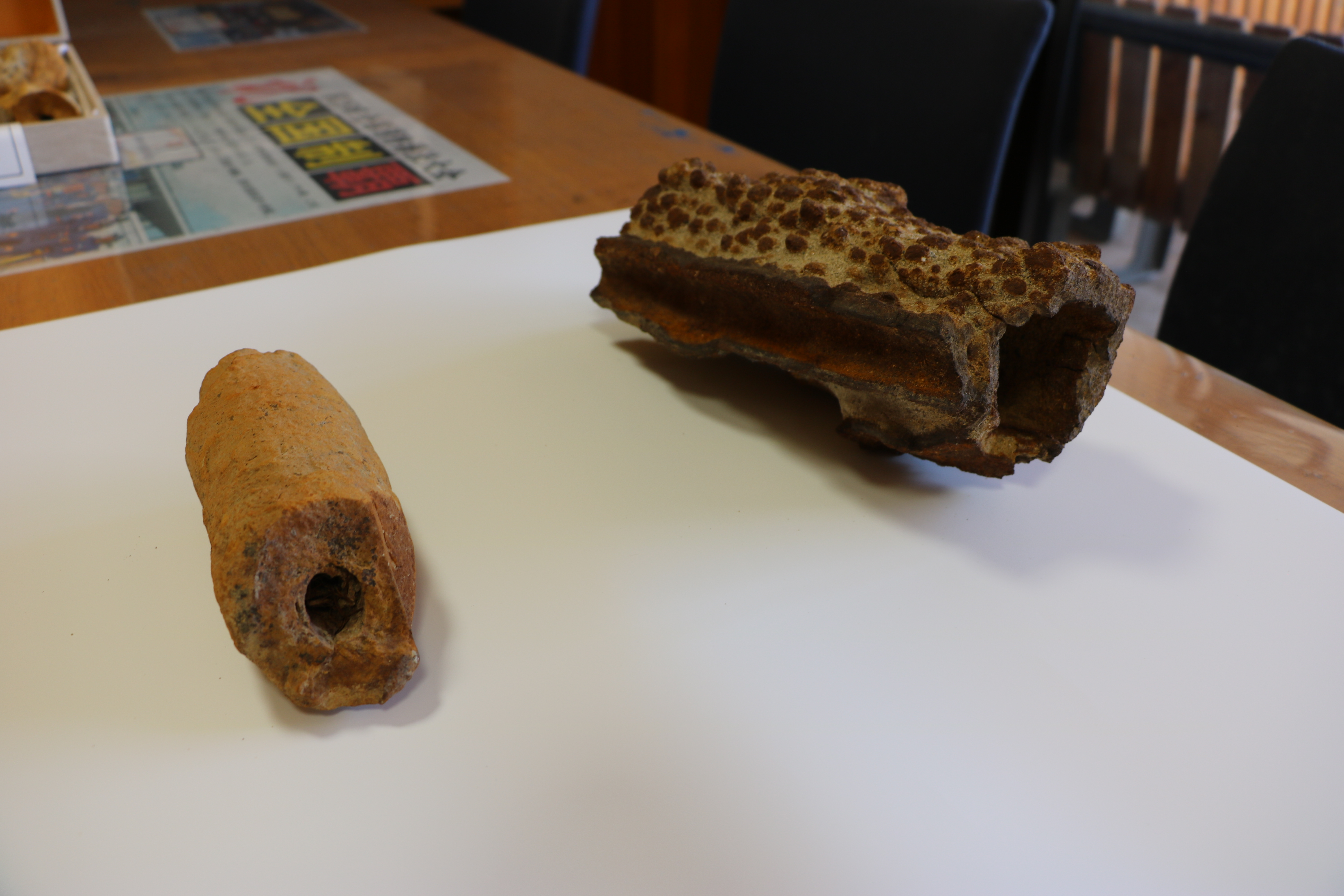 別所高師小僧（国指定天然記念物、滋賀県蒲生郡日野町）南比都佐公民館所蔵。公民館主事立ち合いのもと撮影。